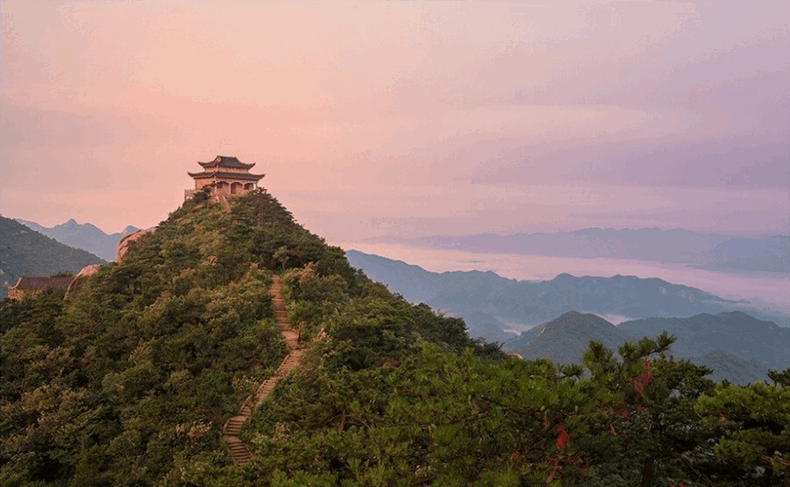 在信阳扫描